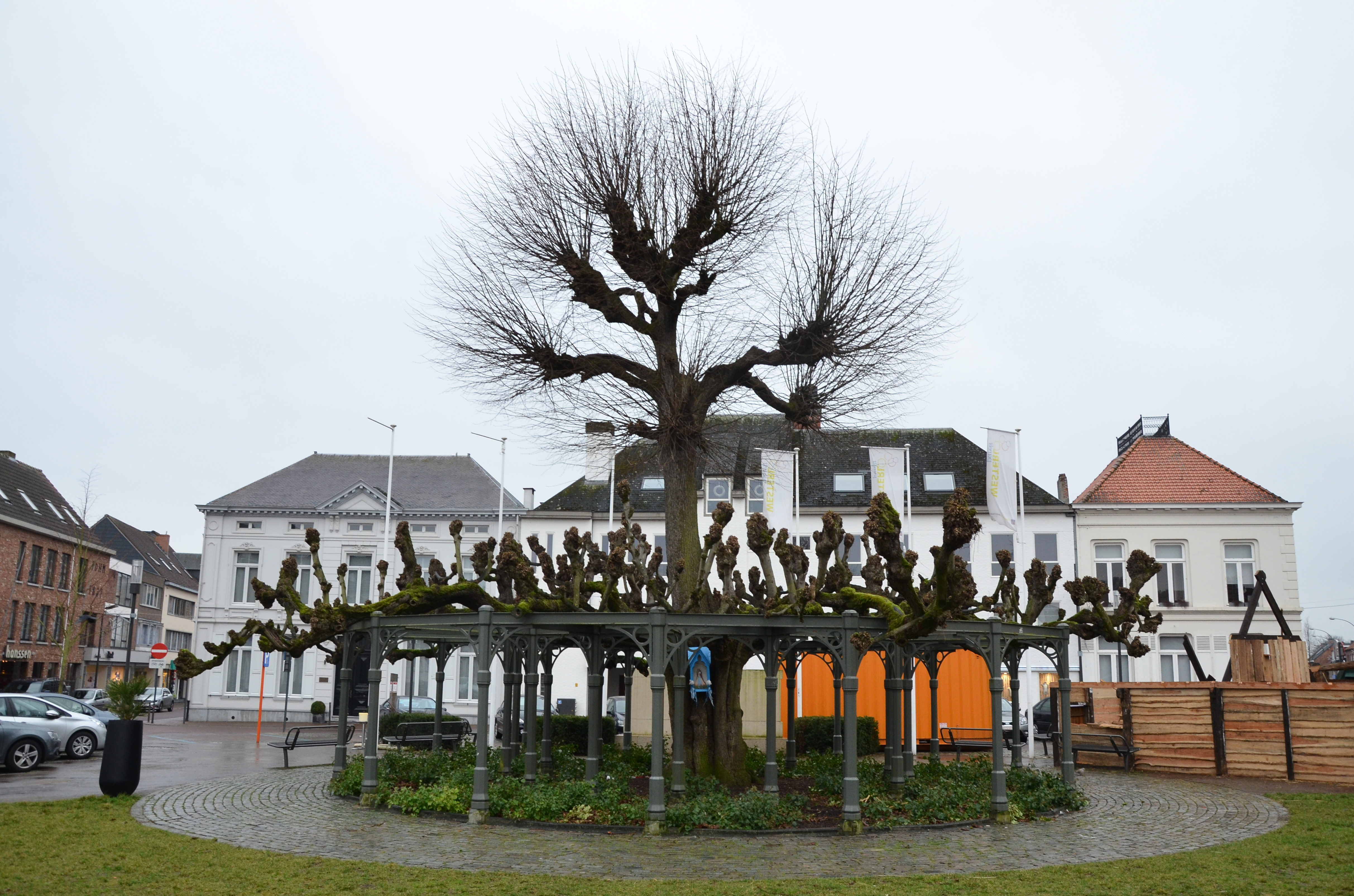 Lindeboom op Grote Markt, Westerlo